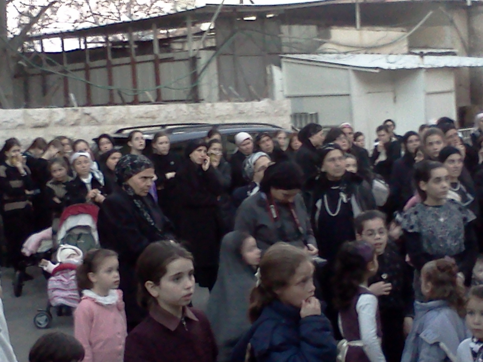 ילדות ונשים מפלג השול בחסידות ברסלב. בתמונה נראות נילדות ונשים מפלג השול בחסידות ברסלב כשהן צופות בחופה בשכונת מאה שערים.